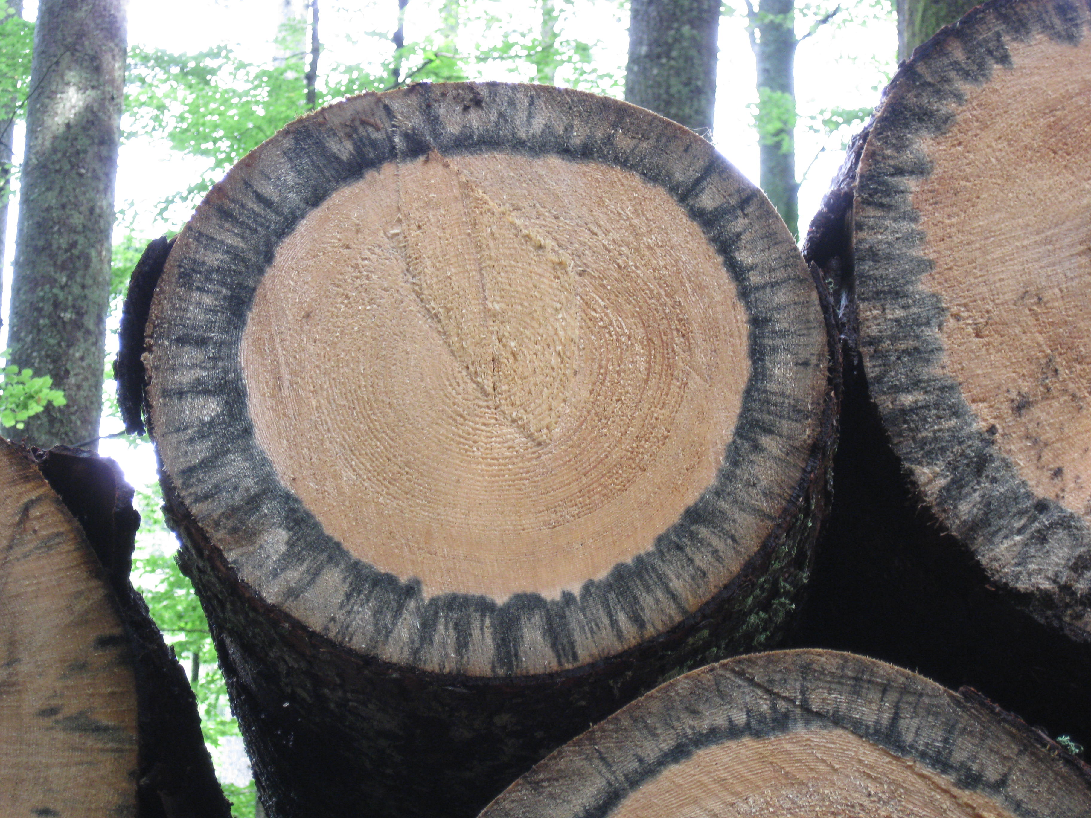 Bläuepilze an gefälltem Holz; im Nationalpark Bayerischer Wald, Folge des Befalls mit Borkenkäfern